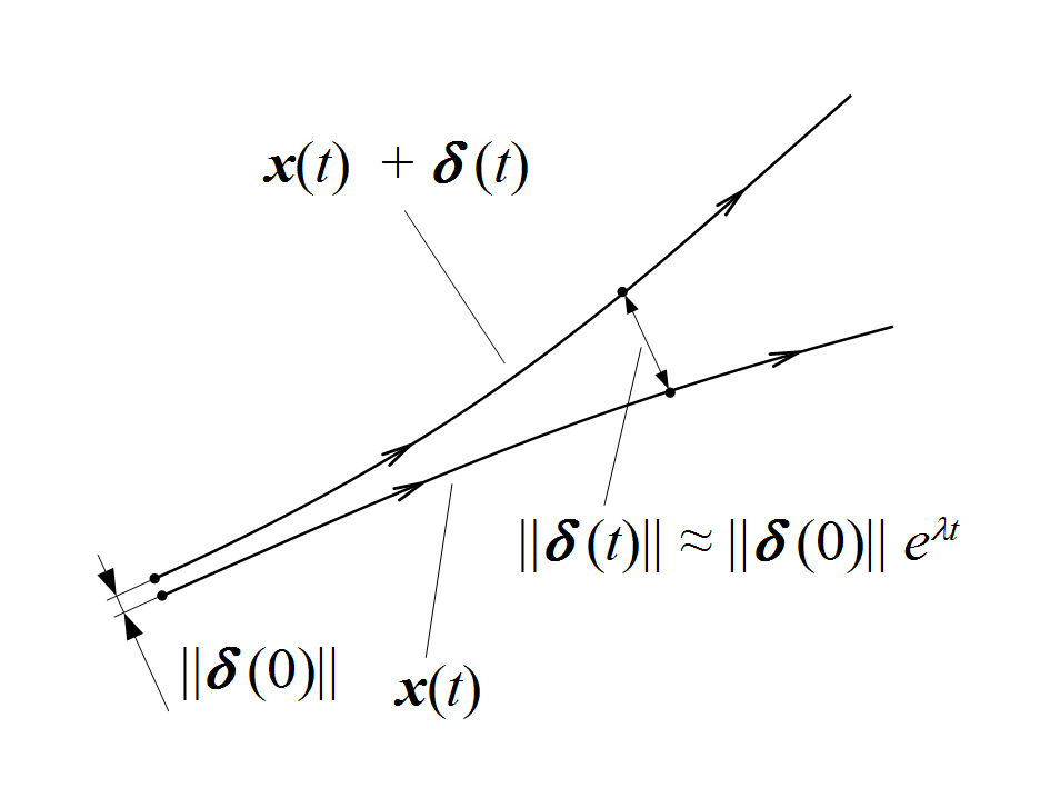 リアプノフ指数の定義と軌道の様子